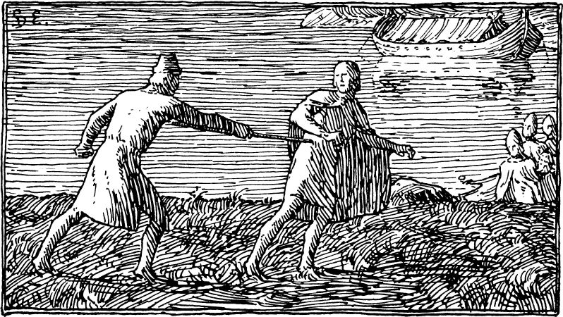 Halfdan Egedius: Illustration for Olav den helliges saga. Snorre Norges Kongesagaer 1899-edition. The illustration wasn't used in the 1899-edition, or for the reprints untill 1978. It has been used in the reprints after 1978. nb: «Her skal du få kjenne en bjarkøying, Karle.» nn: «Her skal du få kjenne ein bjarkøying, Karle.»